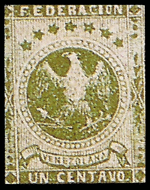 Estampilla Aguilita de la Federación 1863 cuya emicion fue el 1 de noviembre de 1863 valor facial valor facial 1 centavo con tiraje de 75000 piezas de color gris